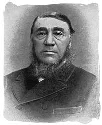 Foto van Paul Kruger